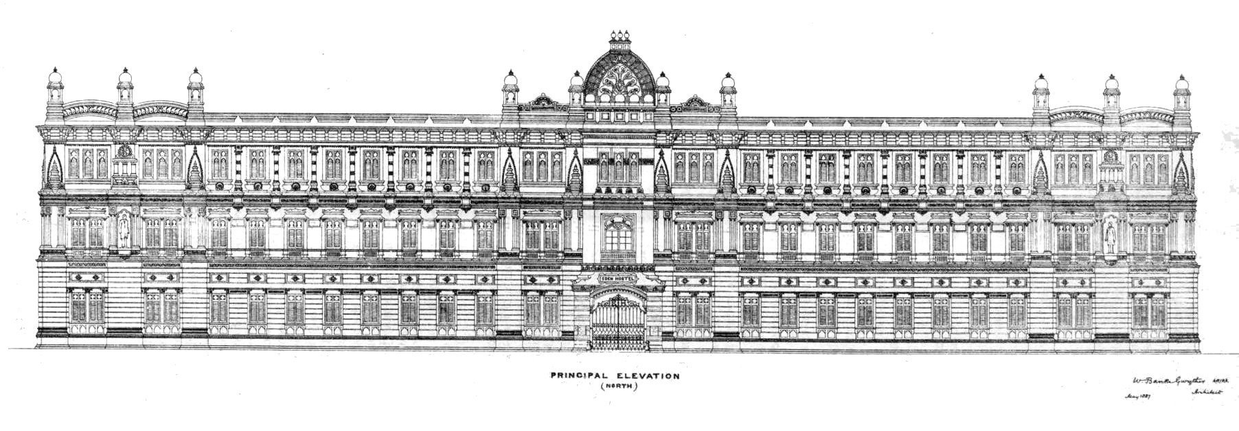 Hindu Hostel, Calcutta